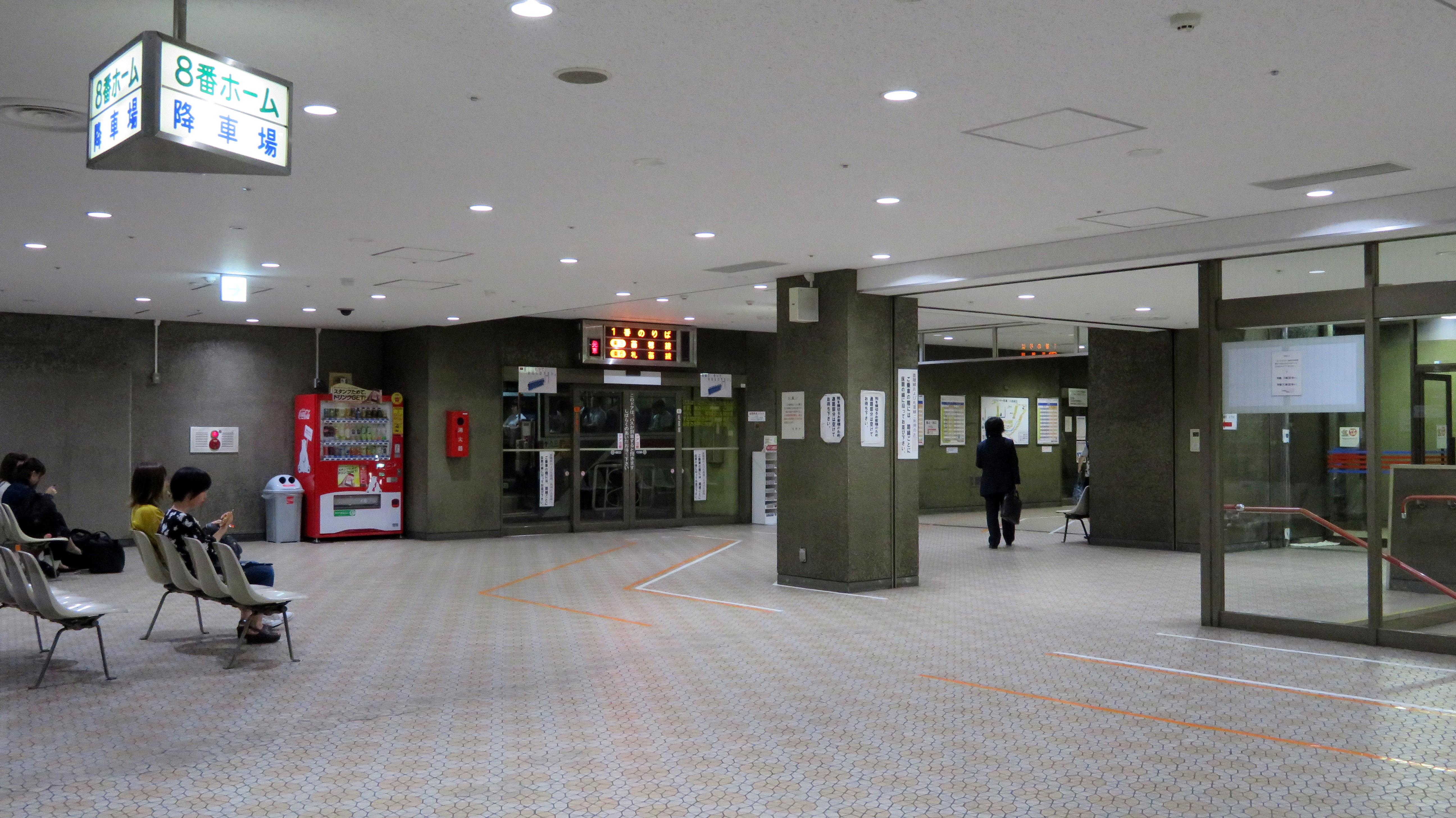 大通バスセンター（地下のりば） Canon PowerShot SX720 HS